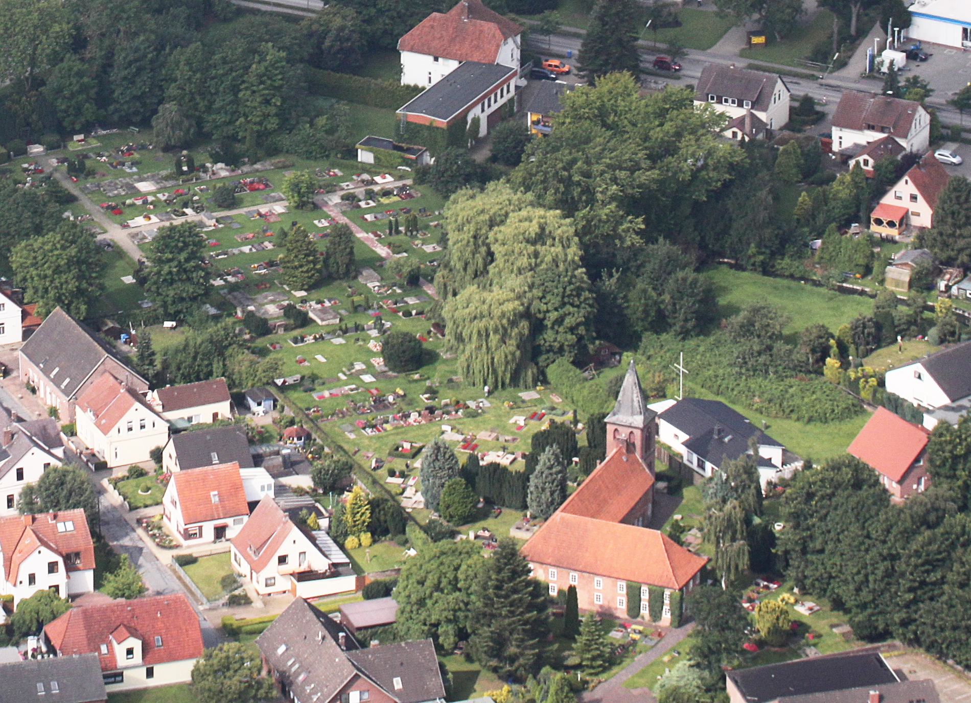 Fotoflug Bremen; Flughöhe 500 m; Elsflether Werft mit Gorch Fock, Elsfleth